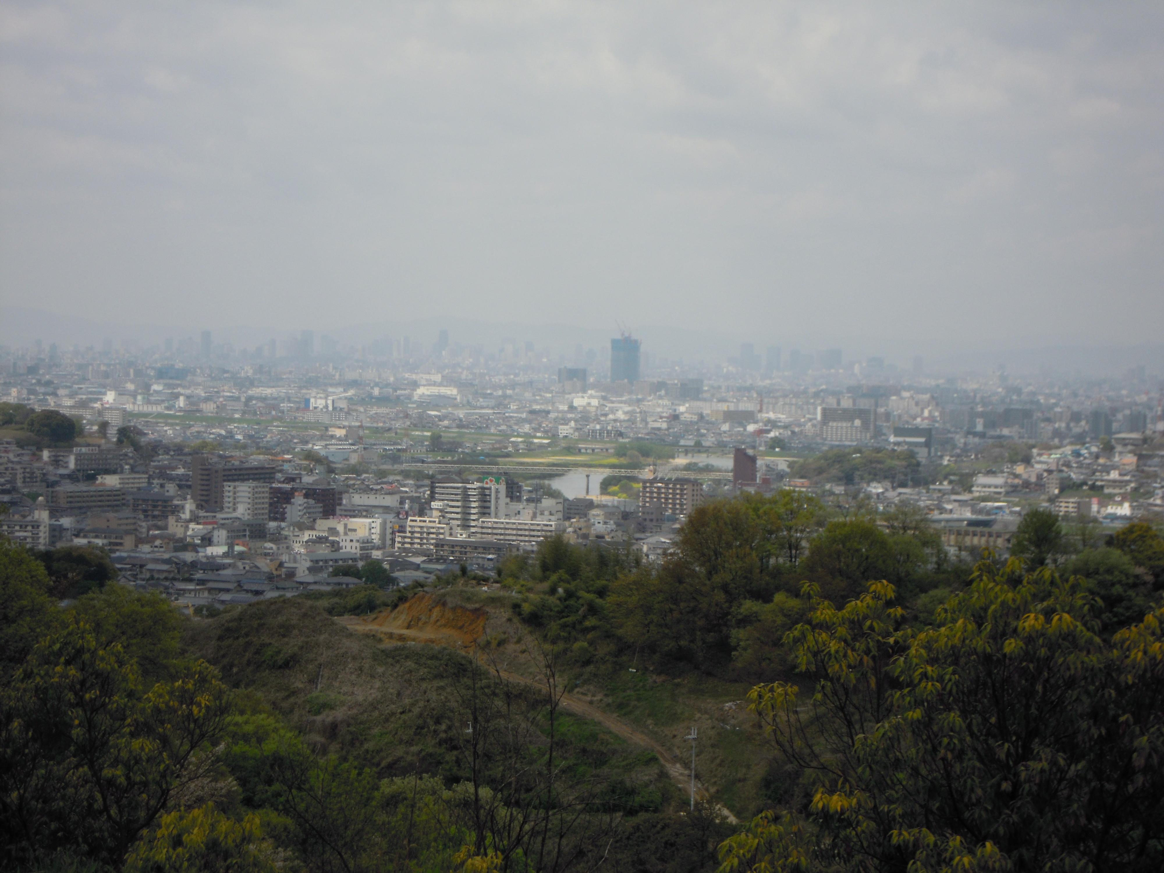 大阪教育大学から柏原市・大阪盆地を望む